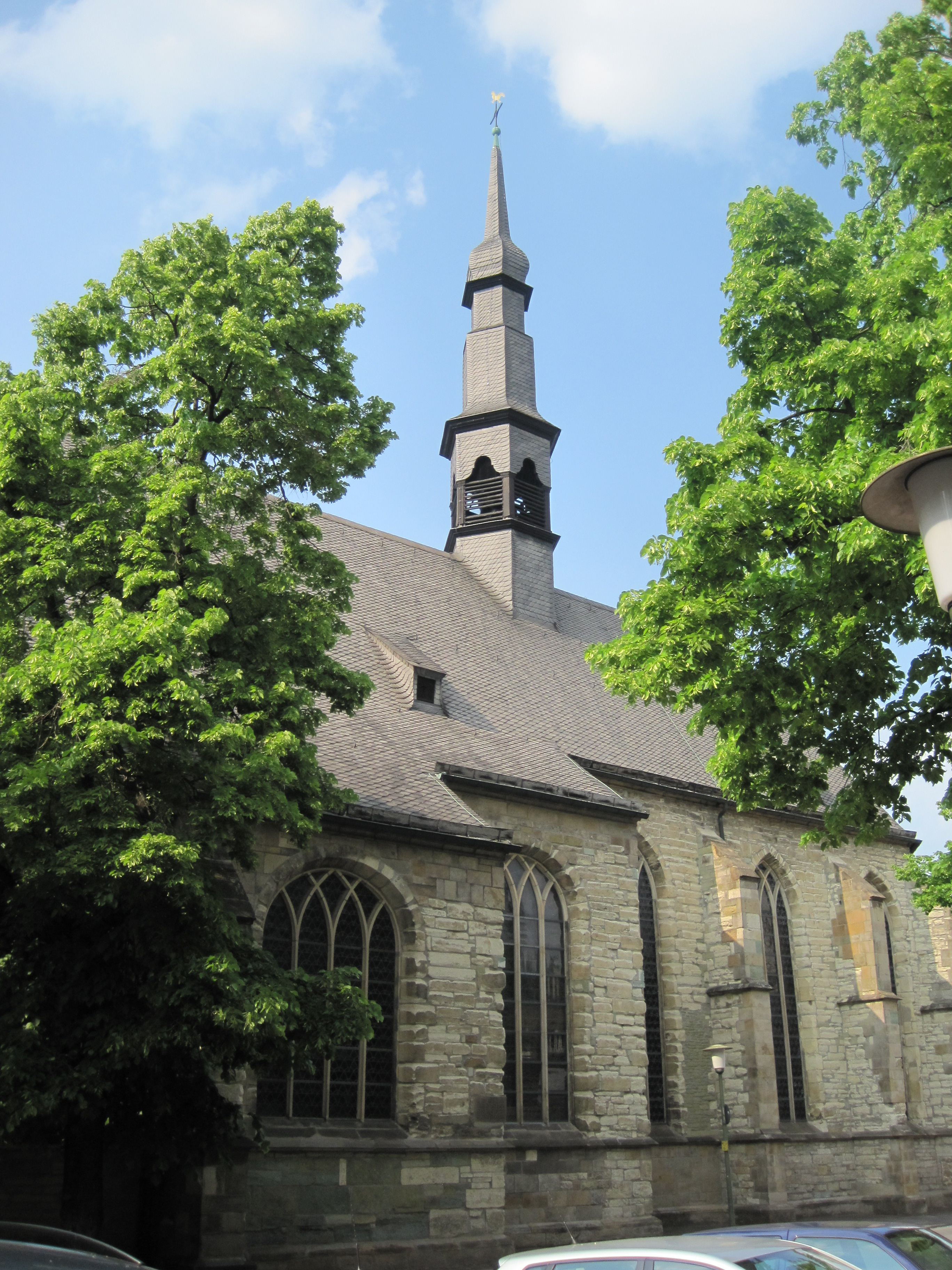 Dieses Foto zeigt die St. Agnes Kirche in Hamm.